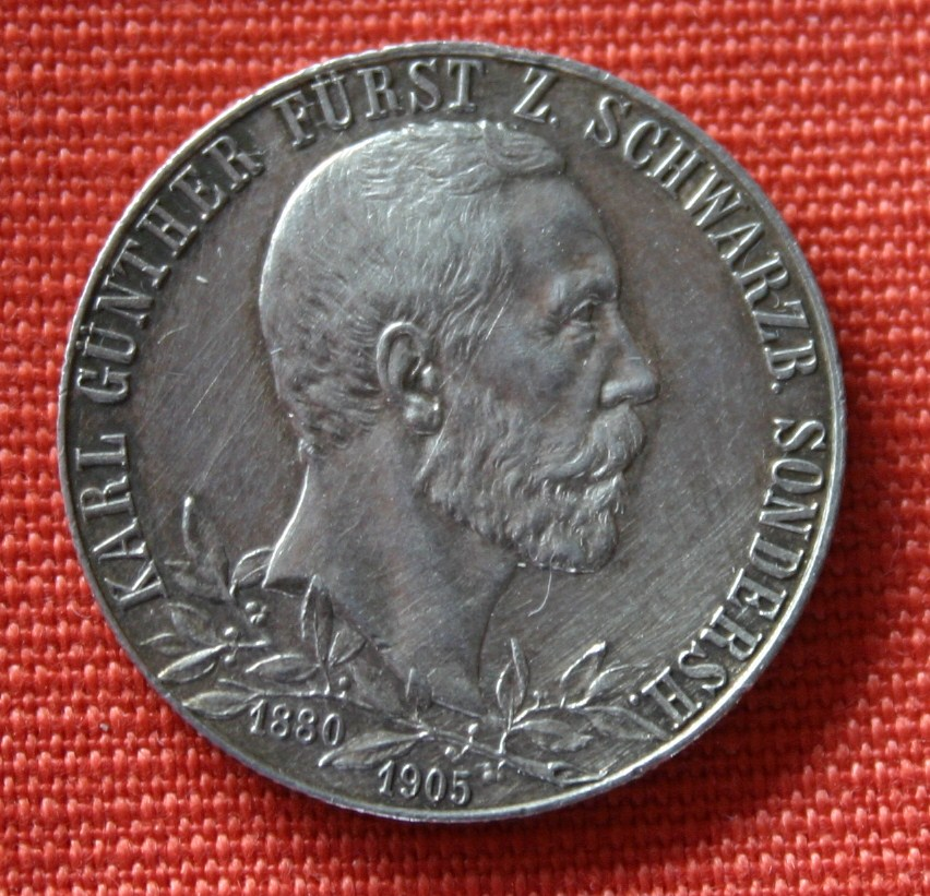 2 Mark Carl Günther von Schwarzburg-Sondershausen von 1905